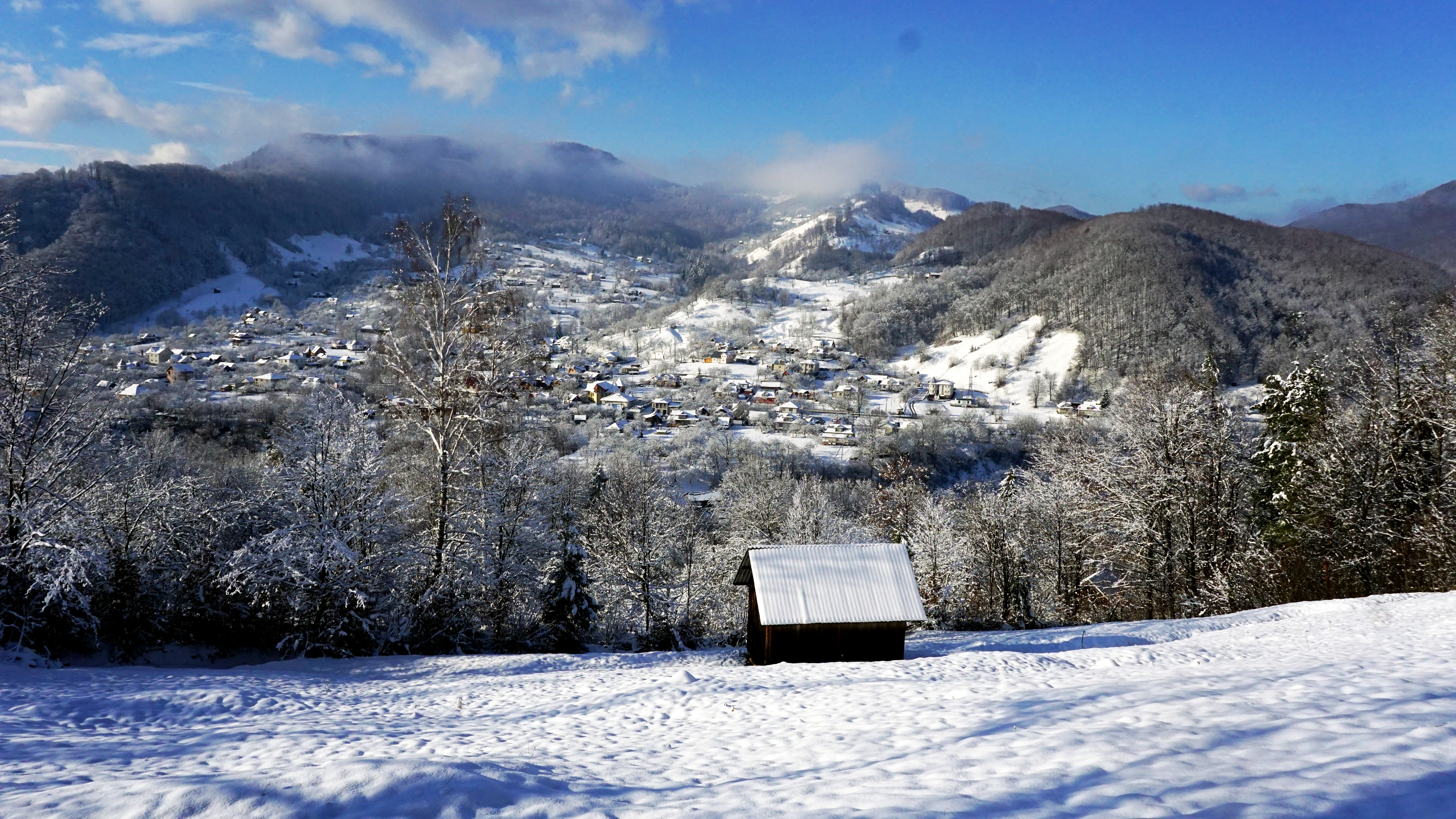 Село Город